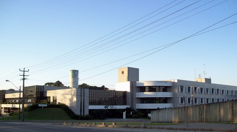 Hospital Angelina Caron em Campina Grande do Sul (Grande Curitiba), PR, Sul do Brasil.